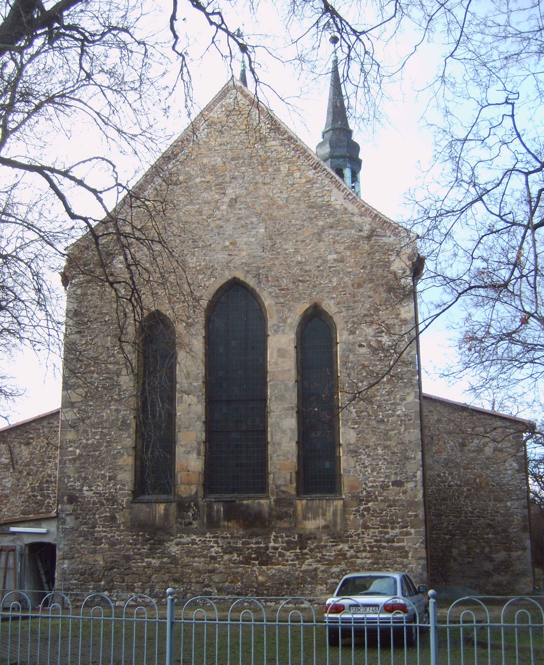 Chor der St. Jakobi-Kirche Schönebeck (Elbe), Sachsen-Anhalt